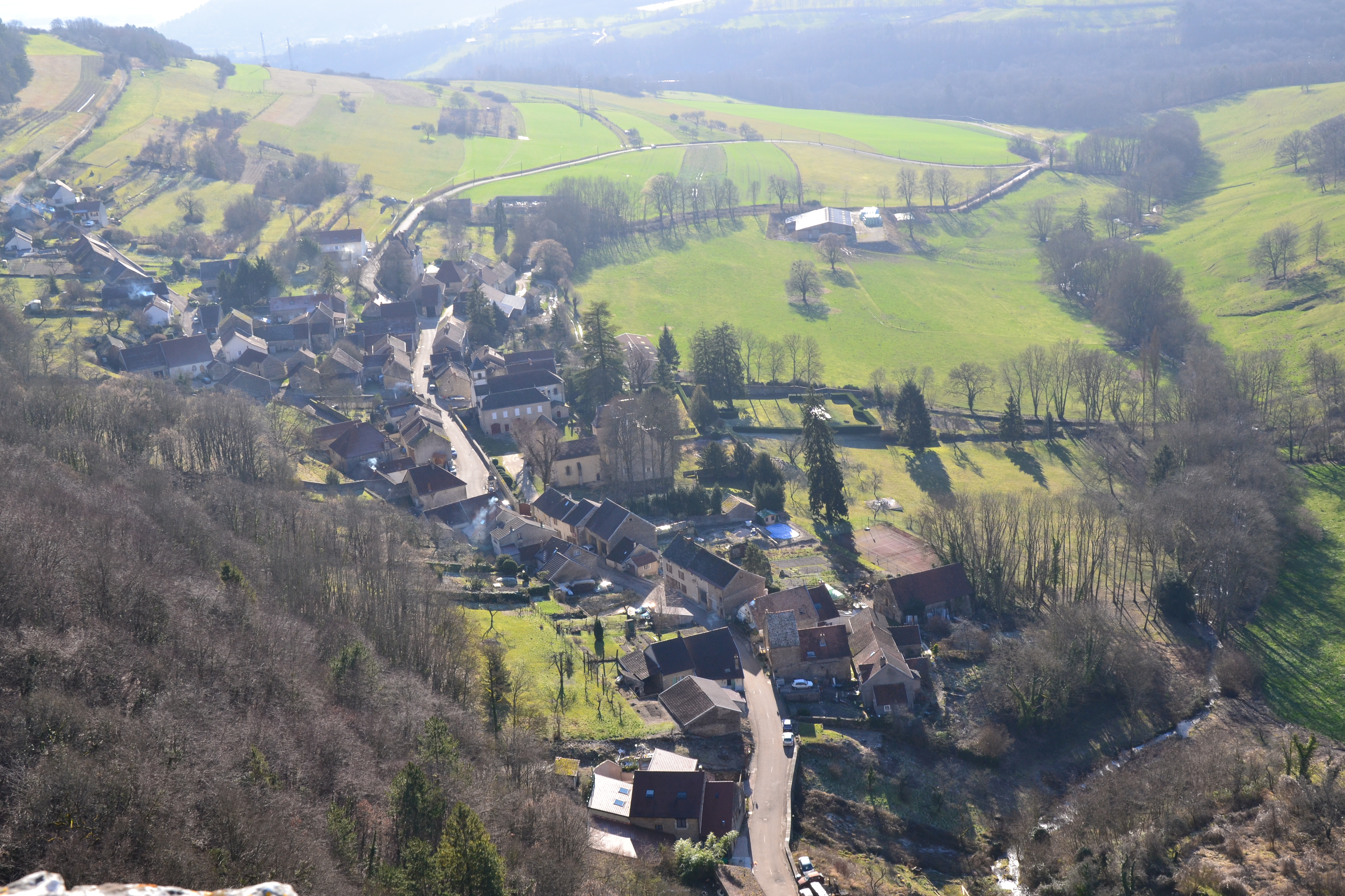 Vue de la commune depuis les falaises